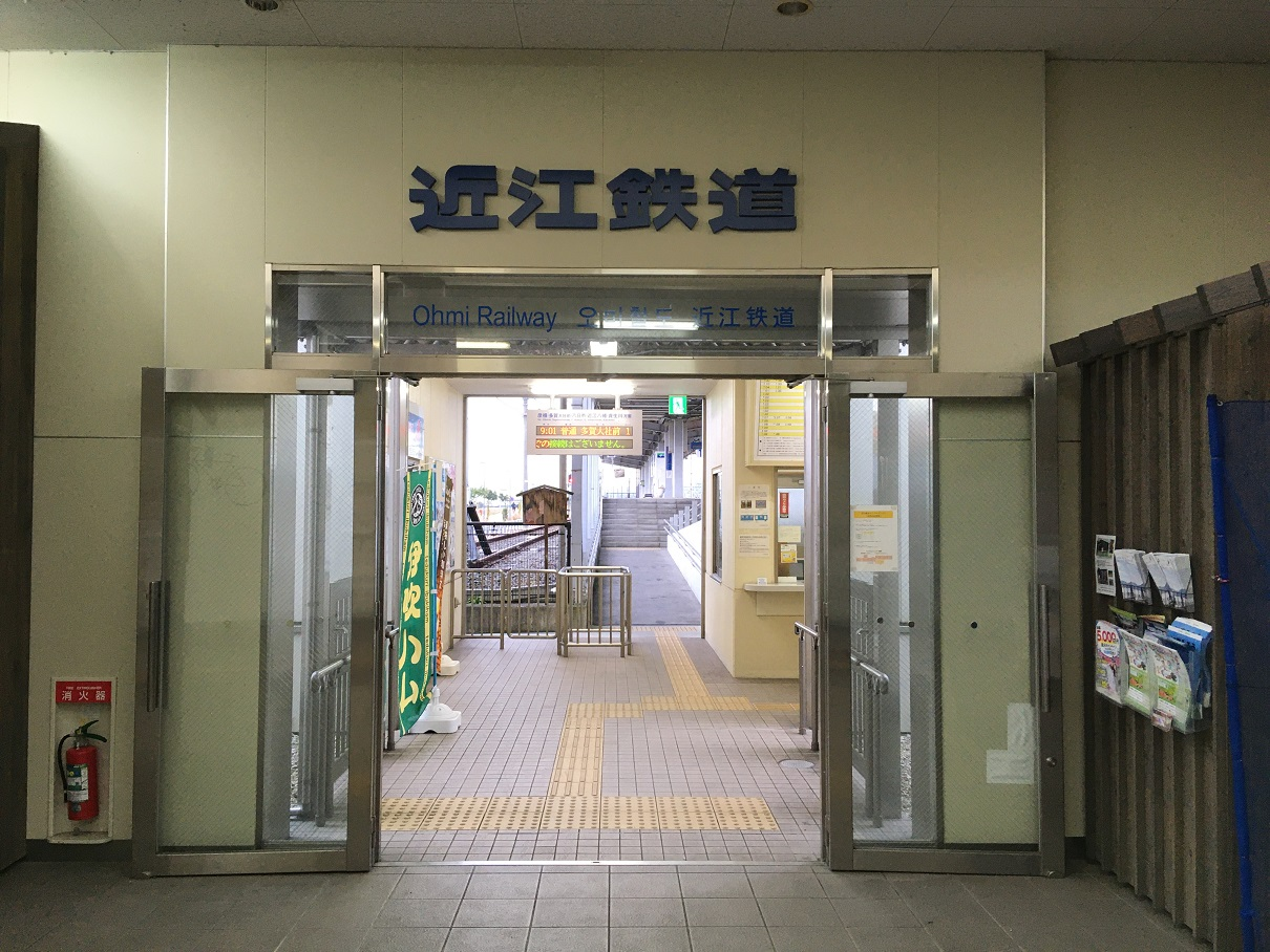 近江鉄道米原駅改札口